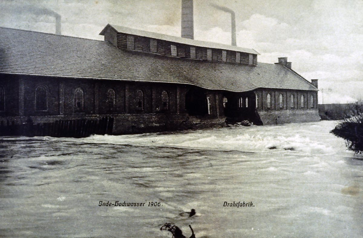 Photo - Eschweiler - Drahtfabrik- Inde-Hochwasser - 1906